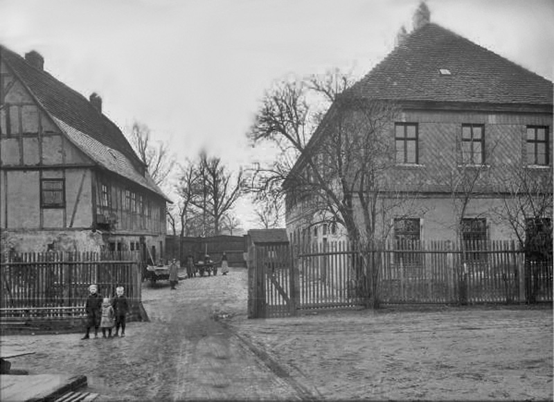 Die Versorgungshäuser (Obdachlosenhäuser) der Stadt Leipzig in der Frankfurter Straße 28 (heutige Jahnallee), dem Gelände der ehemaligen Ratsziegelei.